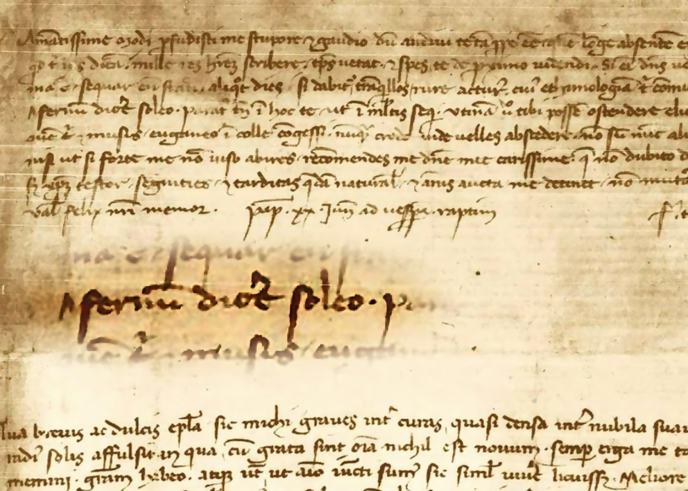 Lettera autografa di Petrarca "Papiae 20 juni ad vesperam raptim" all'amico Moggio di Parma (Modius de Modiis) conservata alla Biblioteca Laurenziana di Firenze, in cui c'è un preciso riferimento ad "Infernum". Moggio de' Moggi, clericus, magister, e notarius era amico del Petrarca. Nella lettera Petrarca scrive: “aliquot dies, si dabitur, tranquillos rure acturus, cuius ethimologiam tibi committo. Ego quidem Infernum dicere solèo” “se sarà possibile, trascorrerò alcuni giorni tranquilli in campagna, di cui ti allego l’etimologia. Veramente, sono solito chiamarla Infernum”